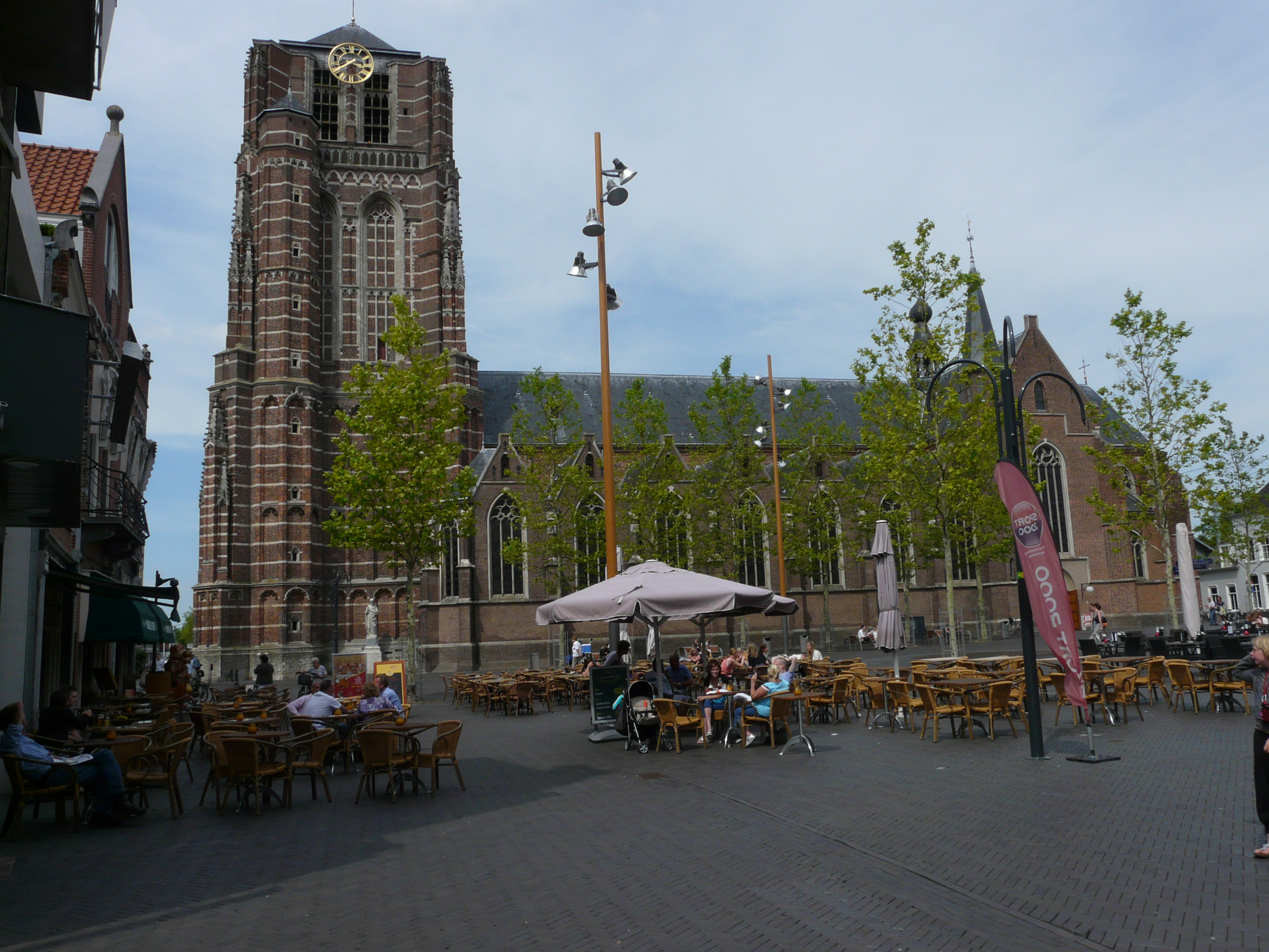 Zicht op de Sint-Jansbasiliek gevestigd aan de Markt 17 in het centrum van Oosterhout